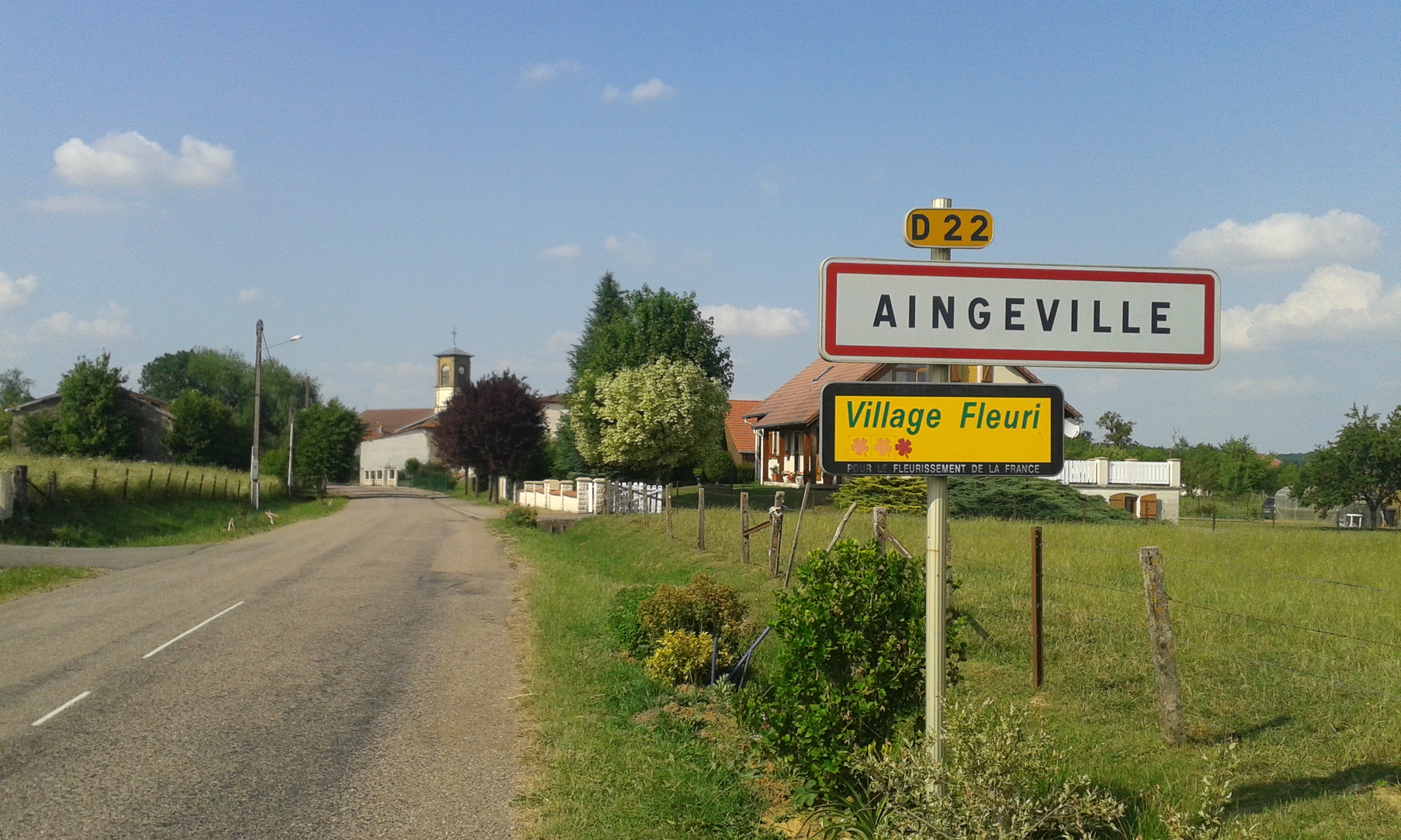 Aingeville, 3 fleurs au concours des Villes et Villages fleuris